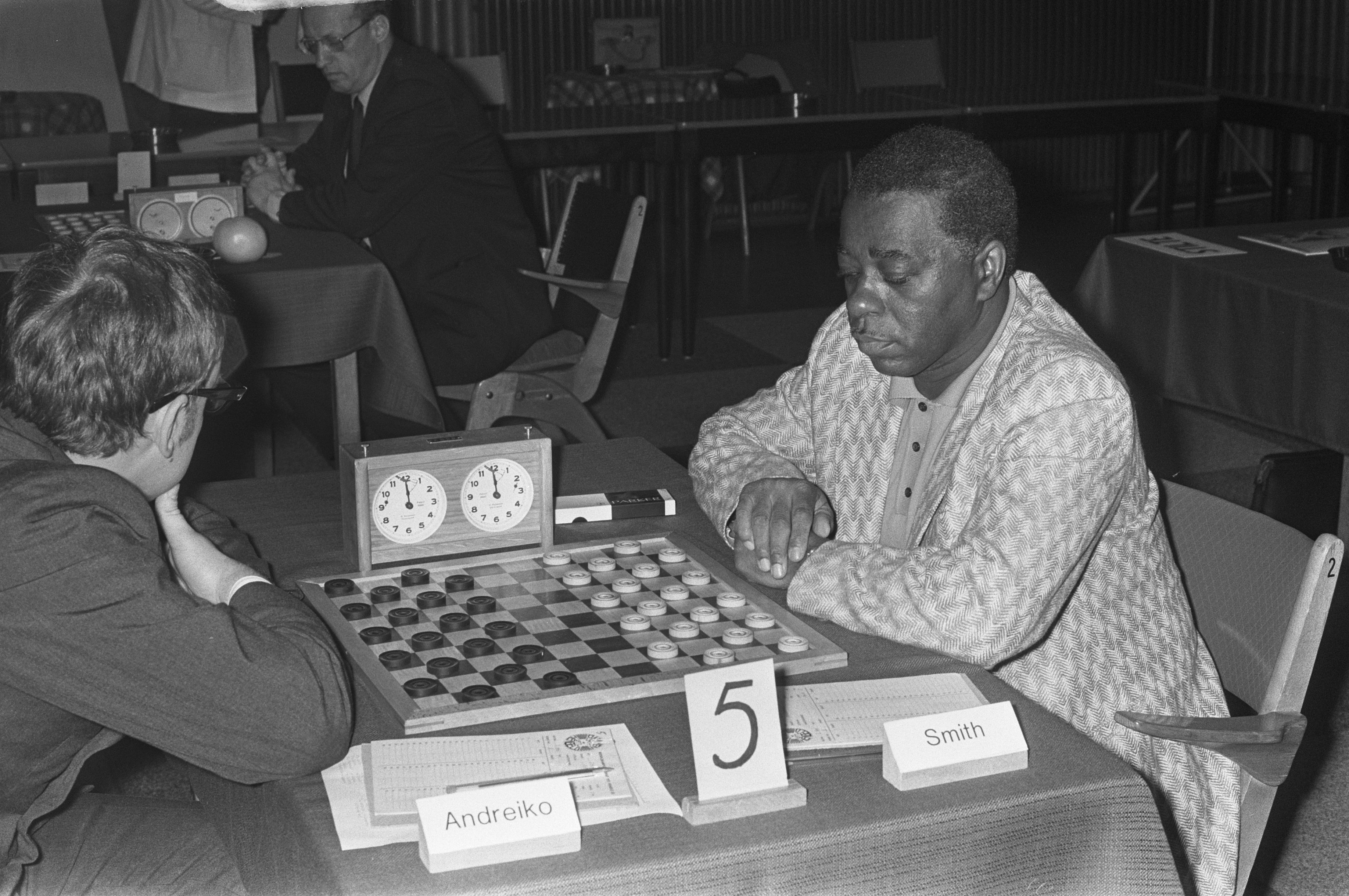 Wereldkampioenschap dammen, nummer 6 Smith tegen Andreiko